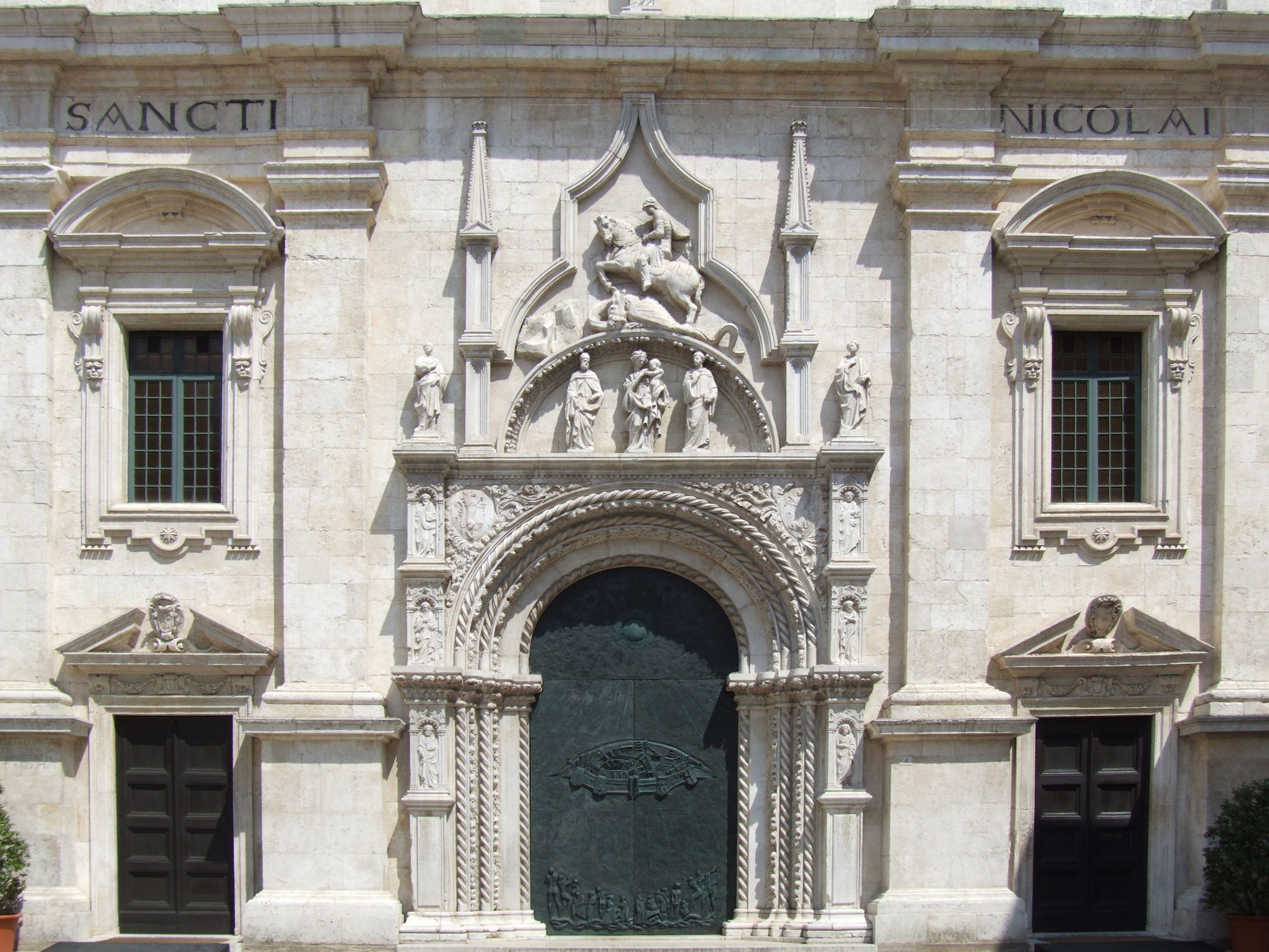 Basilica di San Nicola a Tolentino Native nameBasilica di San Nicola da TolentinoLocationTolentino, ItalyCoordinates43° 12′ 28″ N, 13° 17′ 06″ E Established14th-17th centuriesWeb page control : Q3635709 VIAF: 129156352 GND: 1087192536